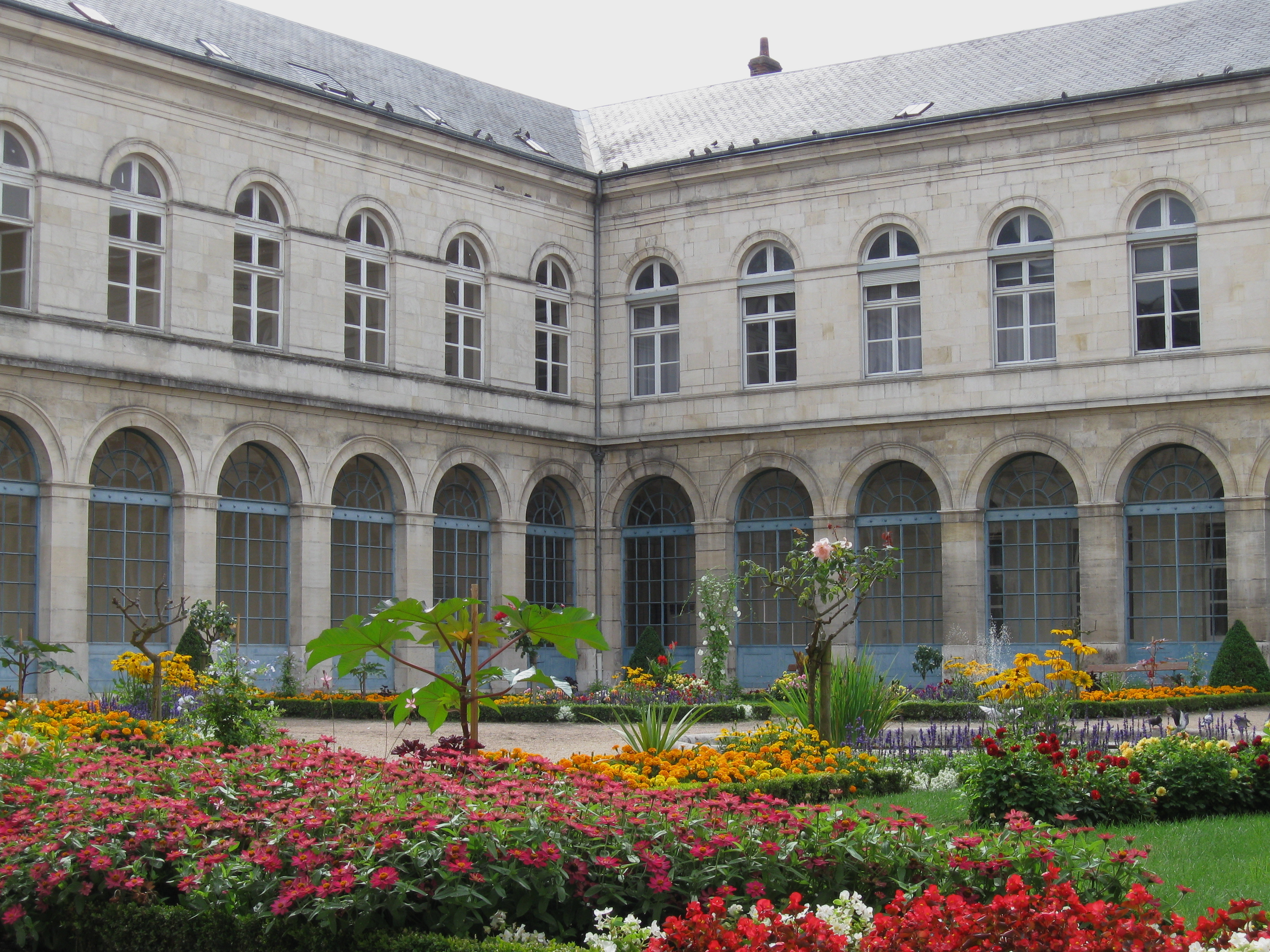 Hôpital Porte Madeleine, Orléans, Loiret, France